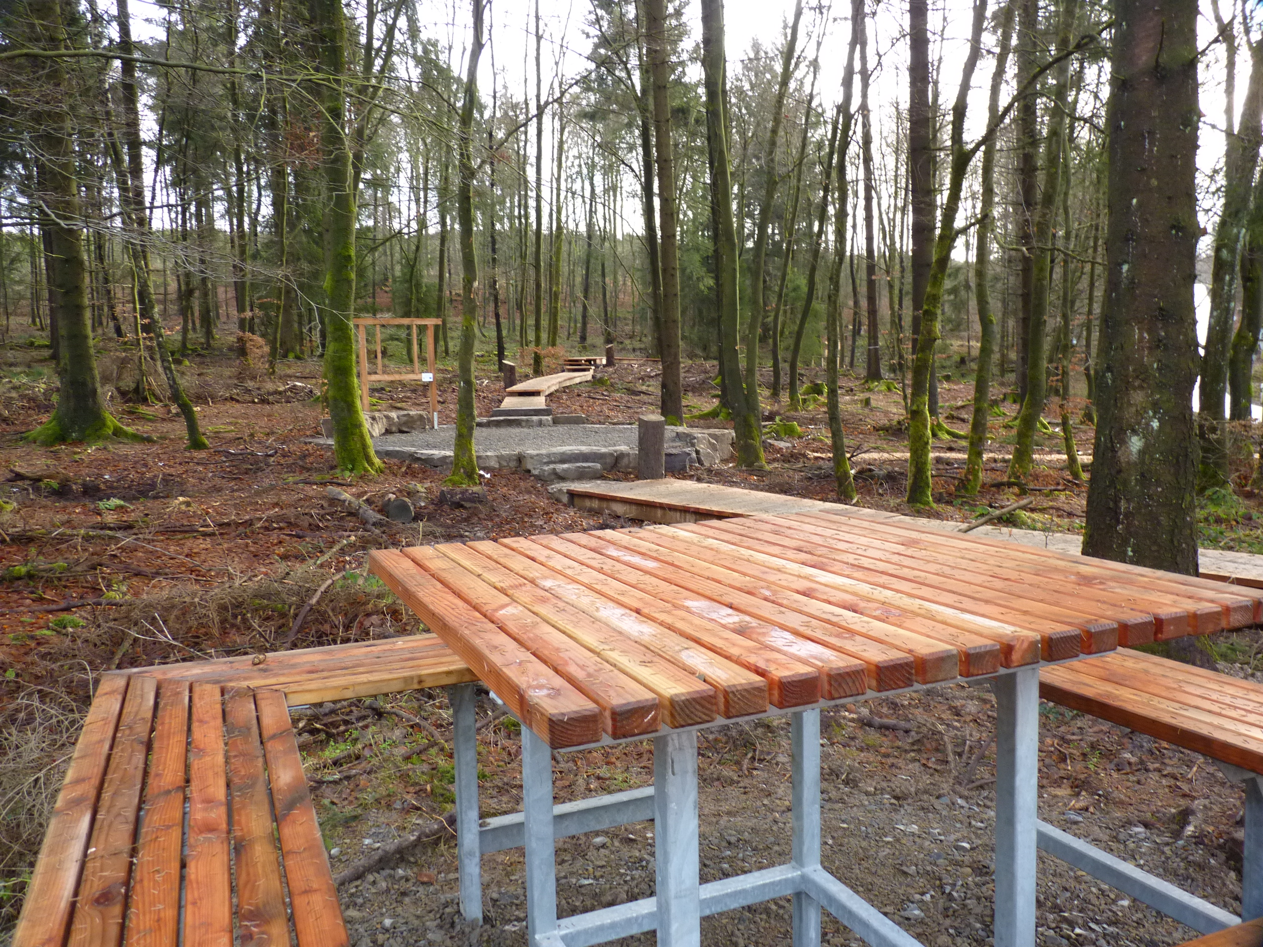 2013 neu angelegter Rundweg durchs Siegquellgebiet